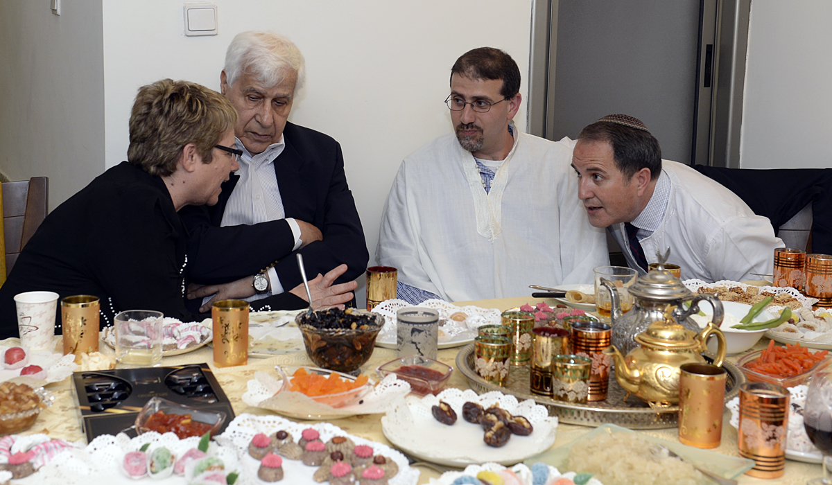 _PDA1634FL